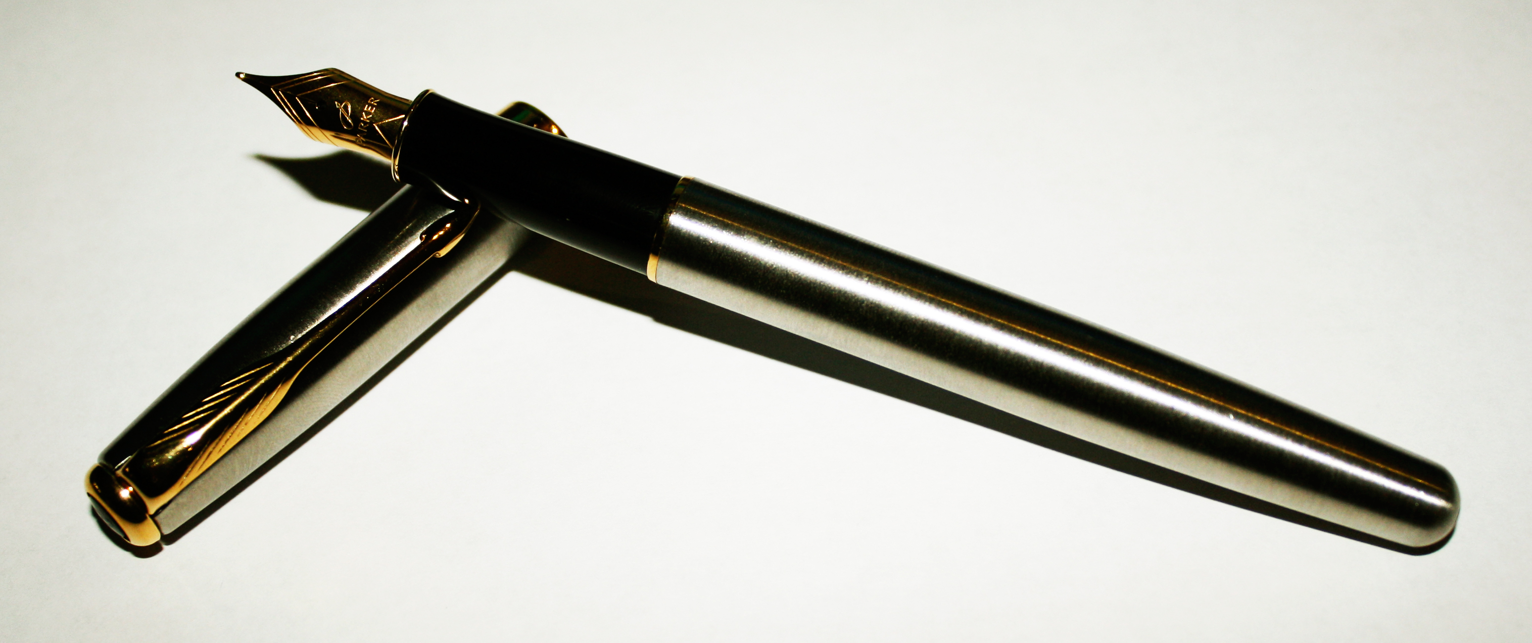 Перьевая ручка Parker Sonnet F527